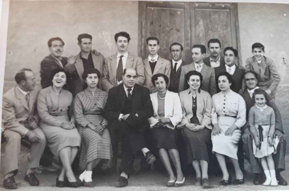 En los años 50' del siglo XX, había en Benifallet, un grupo amateur de teatro, llamado "Grup Teatral Artístic", el cual era dirigido por el médico local Juan Ballester.